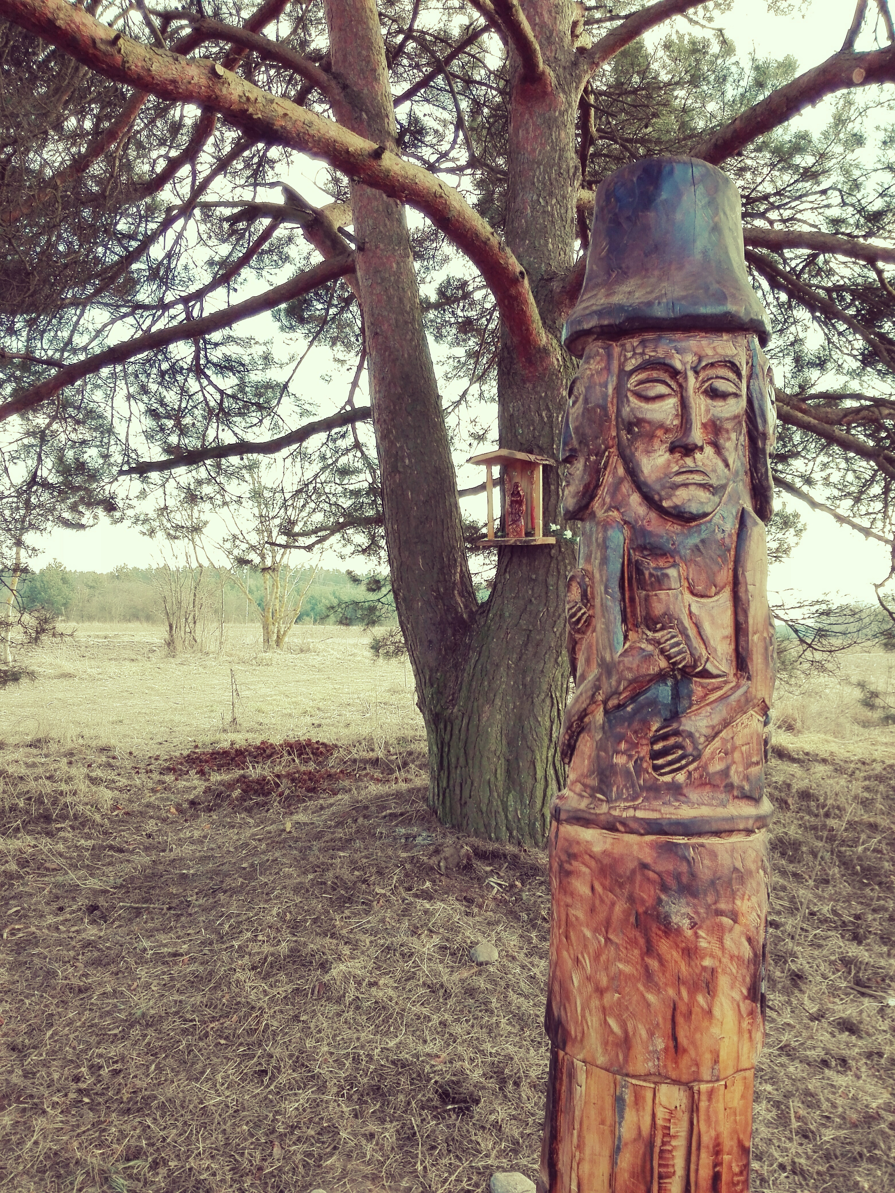 Posąg w Świętym Gaju w Gajownikach